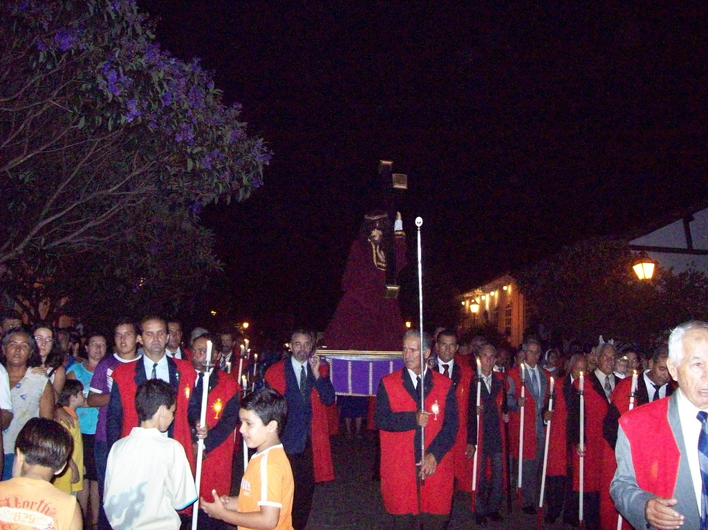 Procissão na Semana Santa de Pirenópolis, Pirenópolis, Goiás.